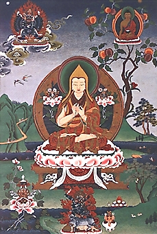 Tsongkhapa in het vijfde visioen van Khedrub Jey. Oorspronkelijke bron: KhedrubJey5_page.htm Bron huidige versie: Info: This image of Je Tsongkhapa is based on the fifth vison of his diciple Khedrub Jey. This version dates from the late 1800s. These images were in the collection of a previous Dali Lama. The digtal version of this image comes from the internet, from KhedrubJey5_page.htm. I have cropped the caption from this image. The original image name was "KhedrubJey5.jpg" The original size of this image is 16" x 24"